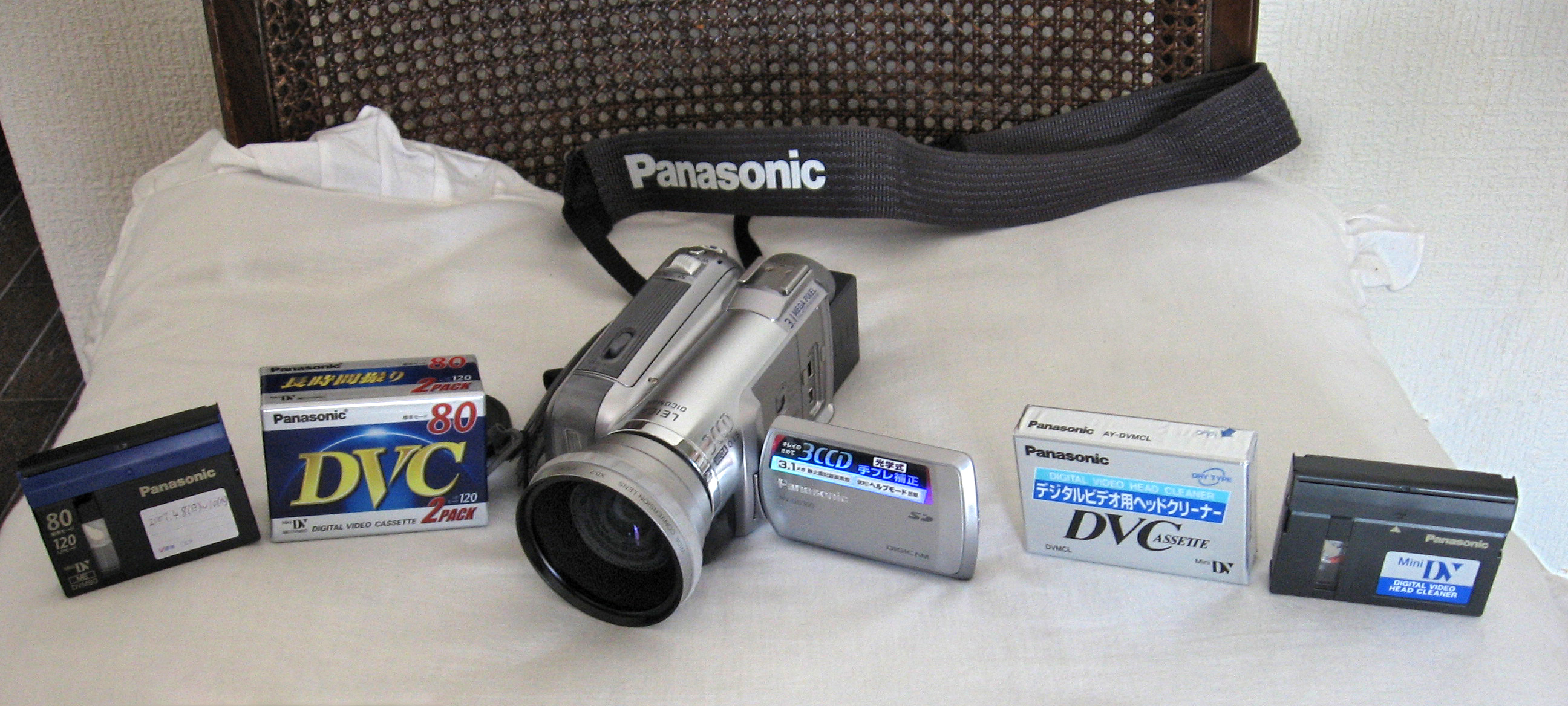 投稿者自身が手持ちのビデオカメラを撮影。 写真は、いずれも松下電器産業から発売されている製品です。 NV-GS300 ビデオカメラ本体 VW-VBD210 バッテリーパック VW-CMD2 ショルダーベルト AY-DVM80V2 撮影用テープ AY-DVMCL クリーニングテープ